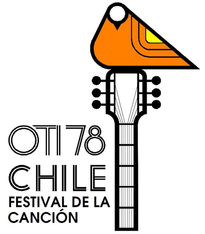 Logo de la edición de 1978 del Festival del la Organización de Televisoras Iberoamericanas (OTI)